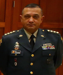 General Juan Carlos Salazar